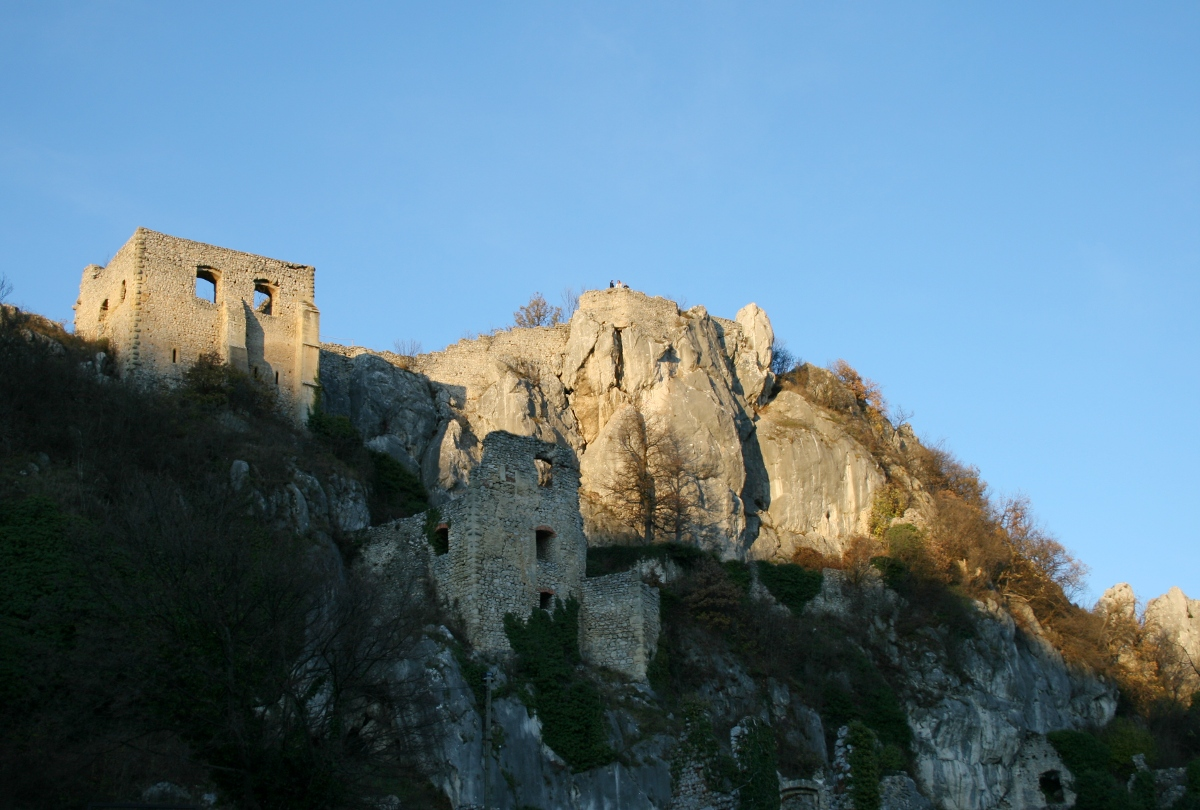 stari grad Kalnik